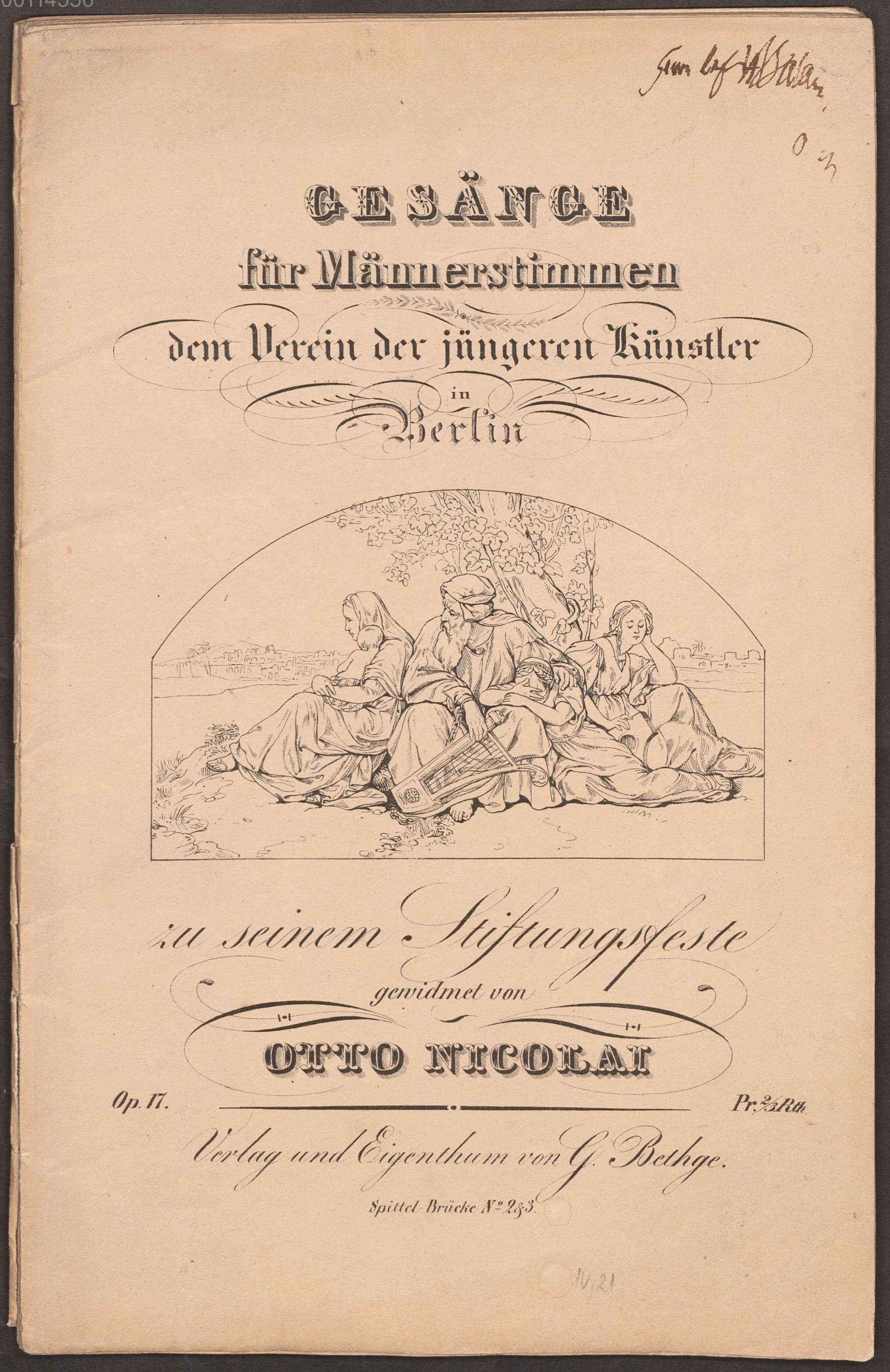 Titelseite von Otto Nicolais Gesänge für Männerchor